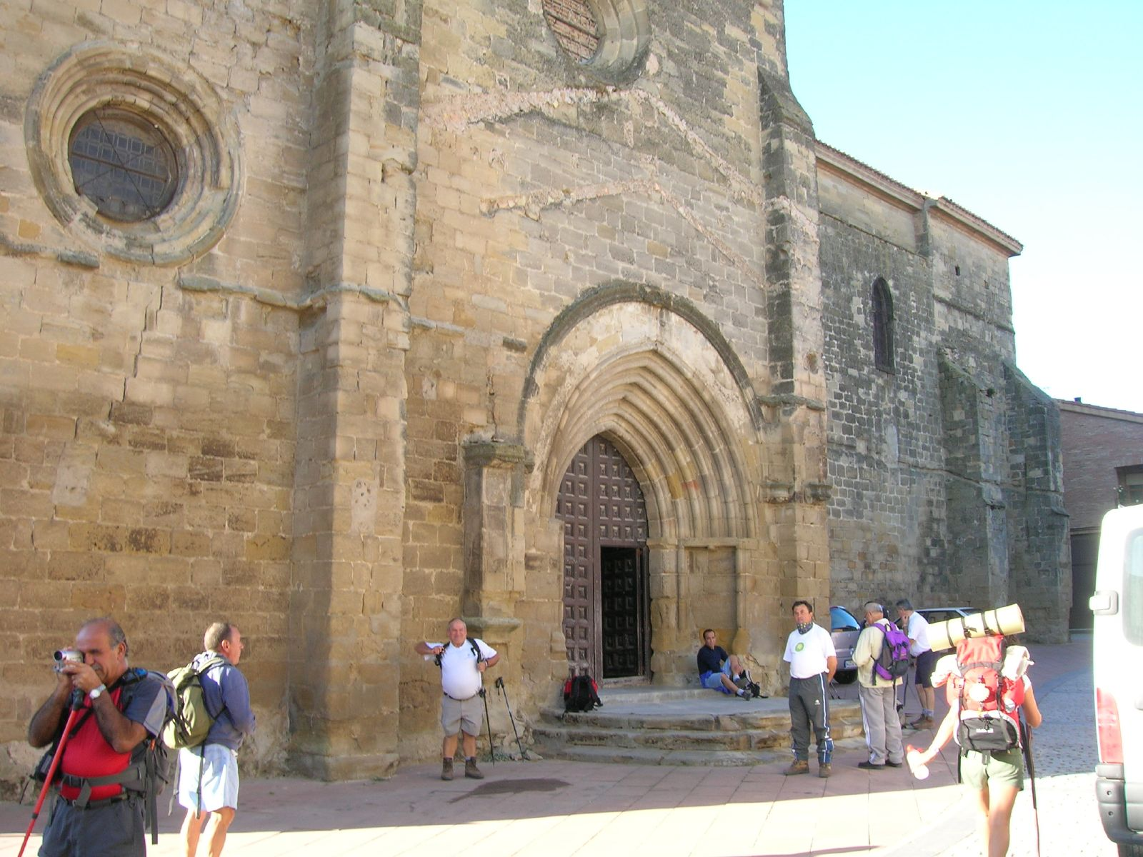 Iglesia de San Juan Bautista de Grañón.